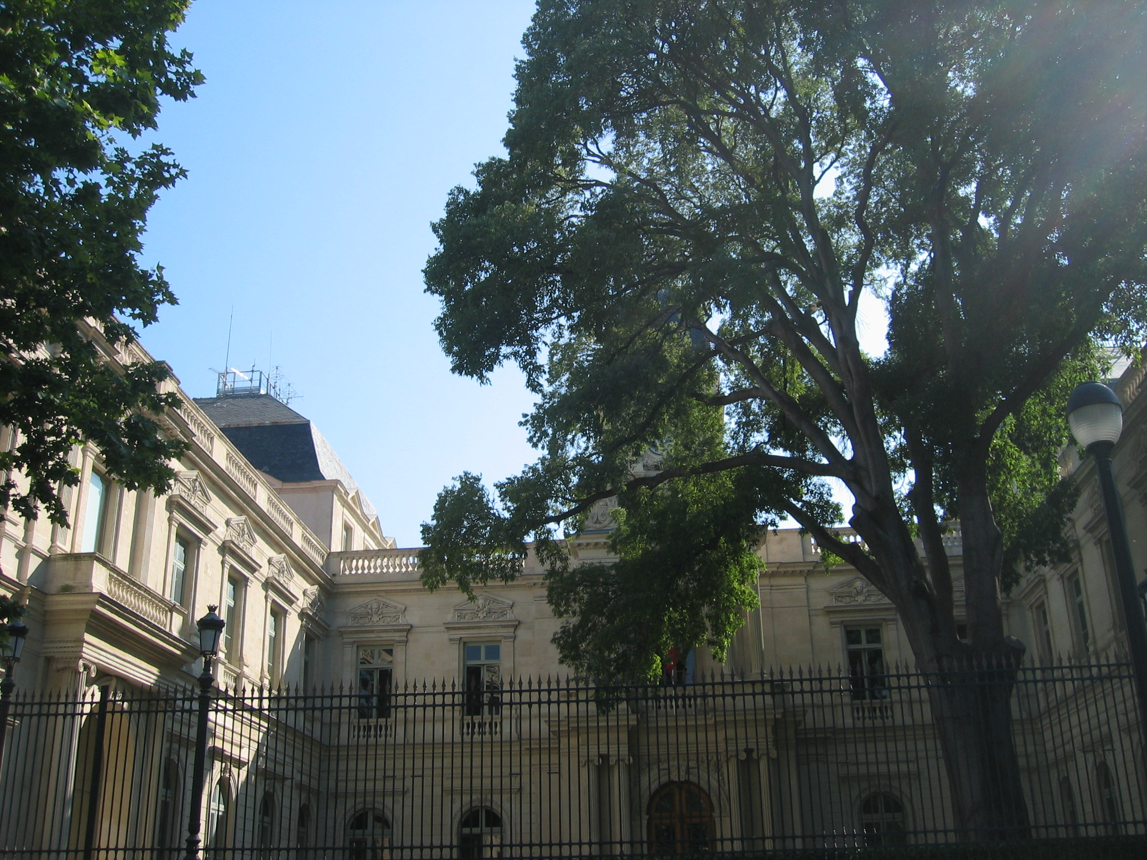 Préfecture du Gard à Nîmes, photo de Nicolas Cadène. Propre travail, redistribution à l'identique.